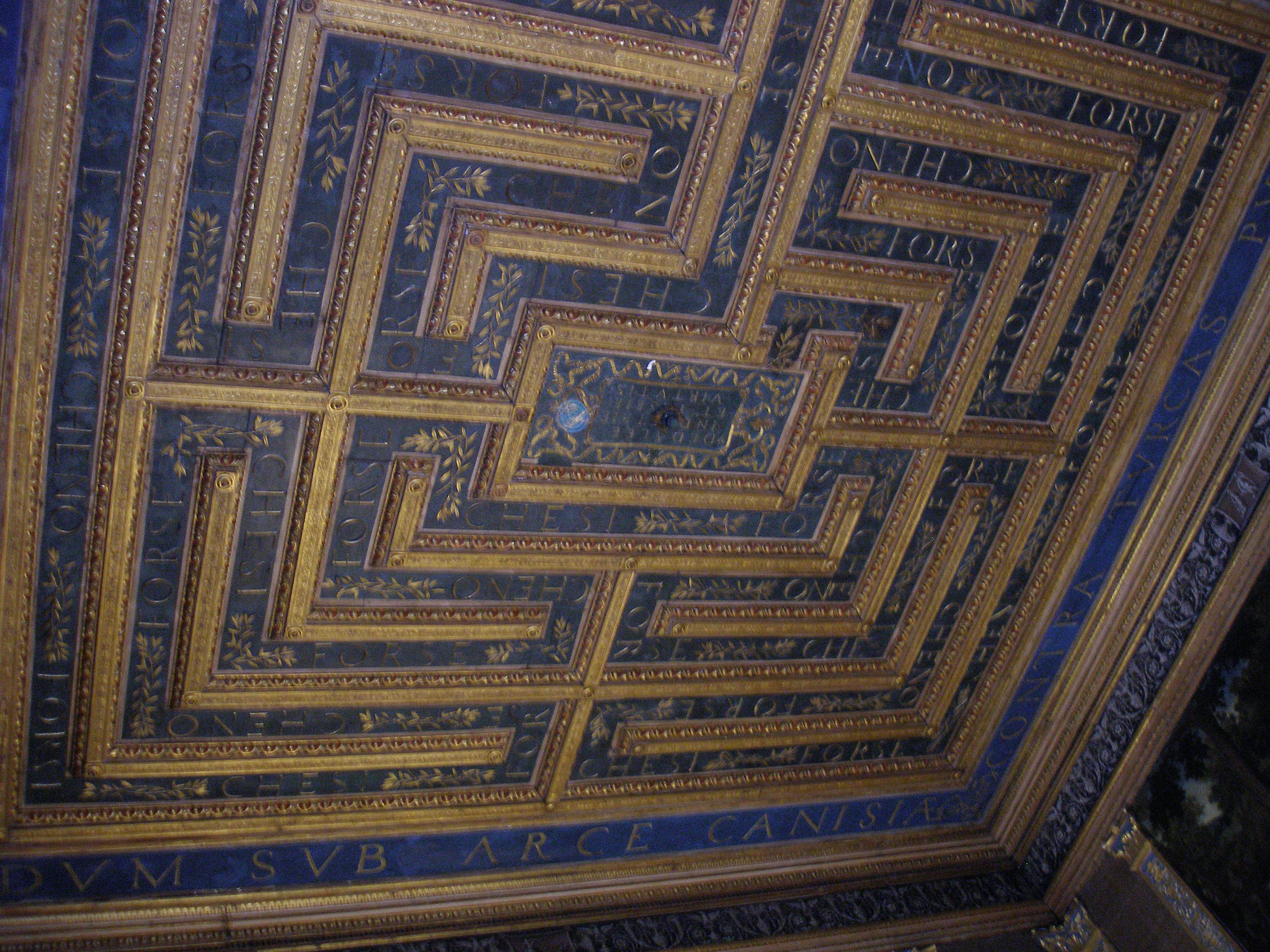 Mantua